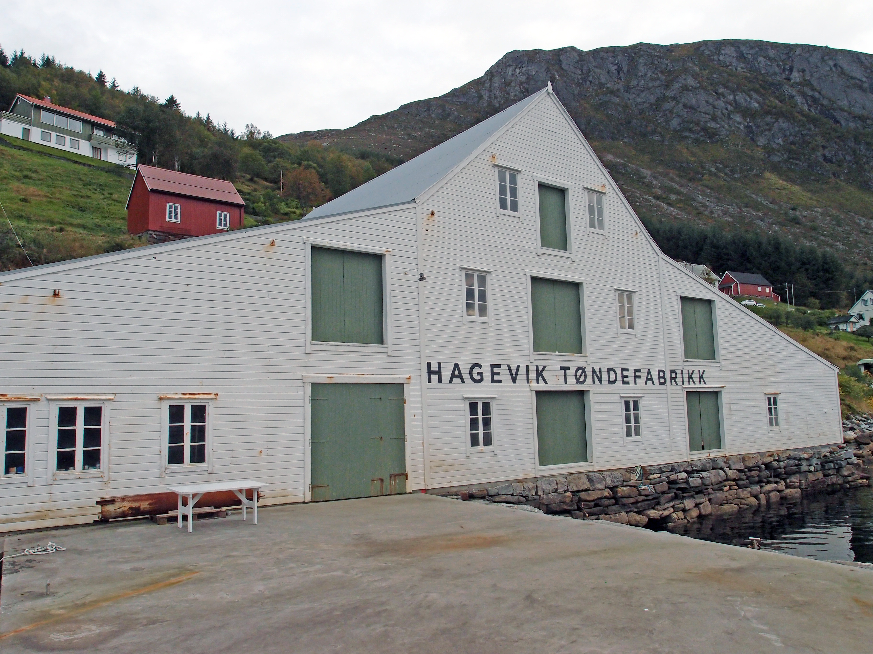 Hagevik Tøndefabrikk ligg ved Ulvesundet i Vågsøy kommune i Sogn og Fjordane. Anlegget er freda av Riksantikvaren.